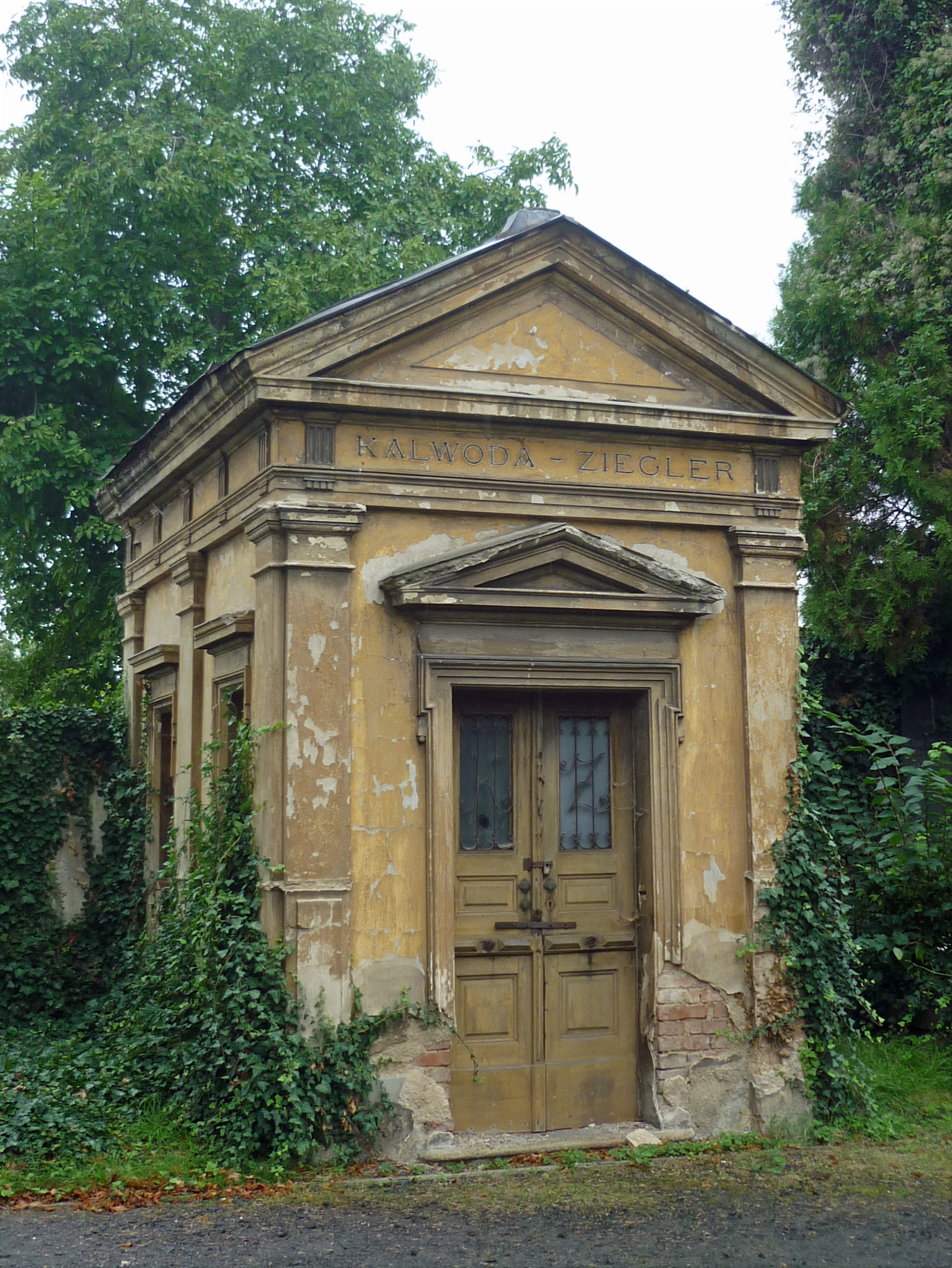 Grufthaus Kalwoda-Ziegler auf dem Saazer Friedhof (Žatec)